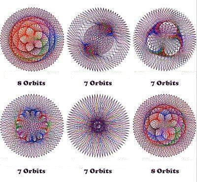 Електронен облак